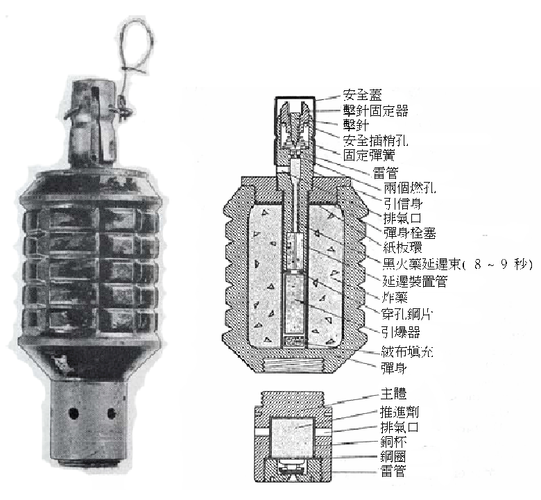 日軍九一式手榴彈